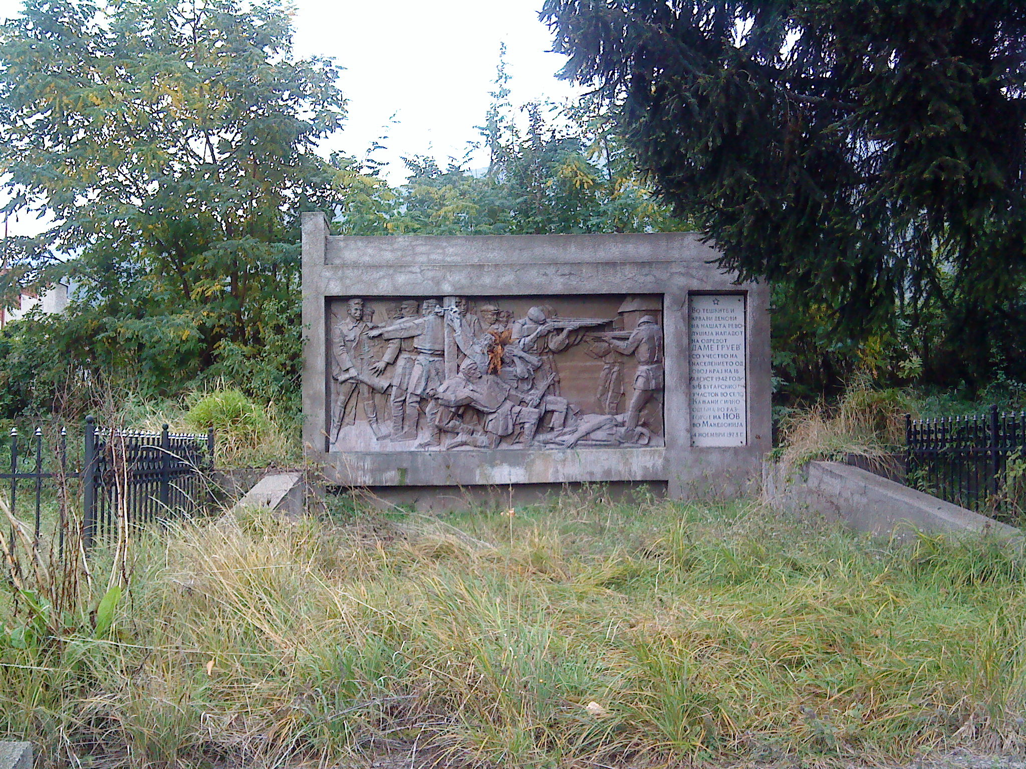 Споменик од народноослободителната војна во с. Кажани